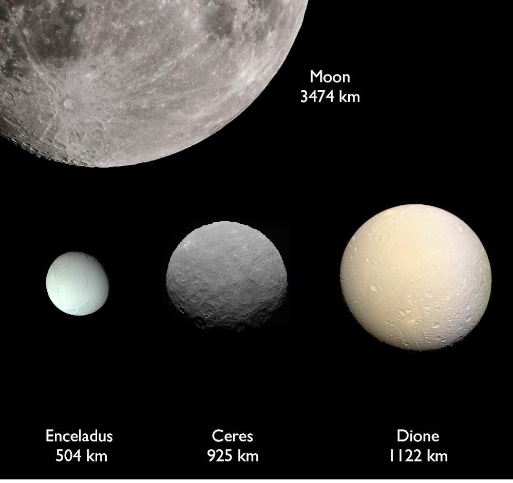 Церера и спутники планет